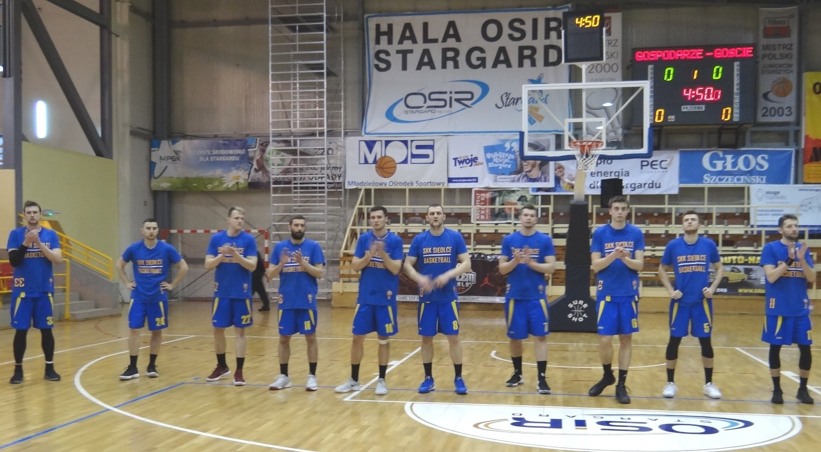 Drużyna SKK Siedlce